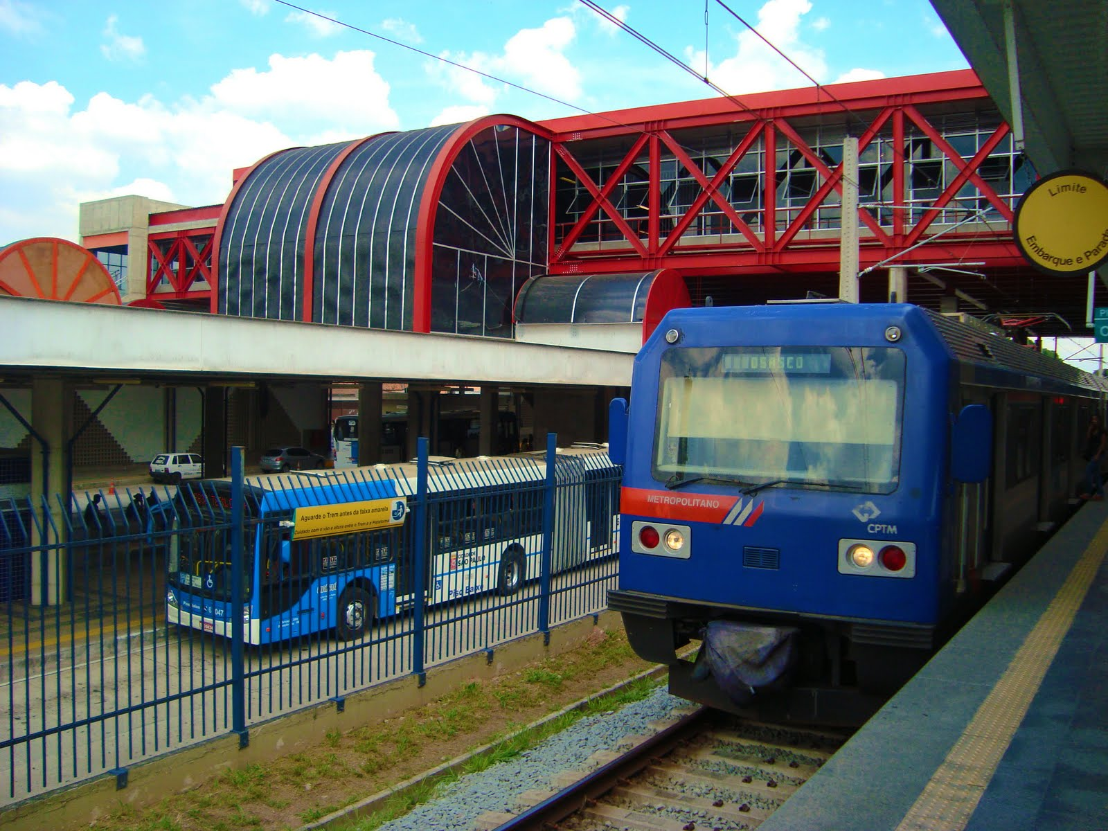 Terminal